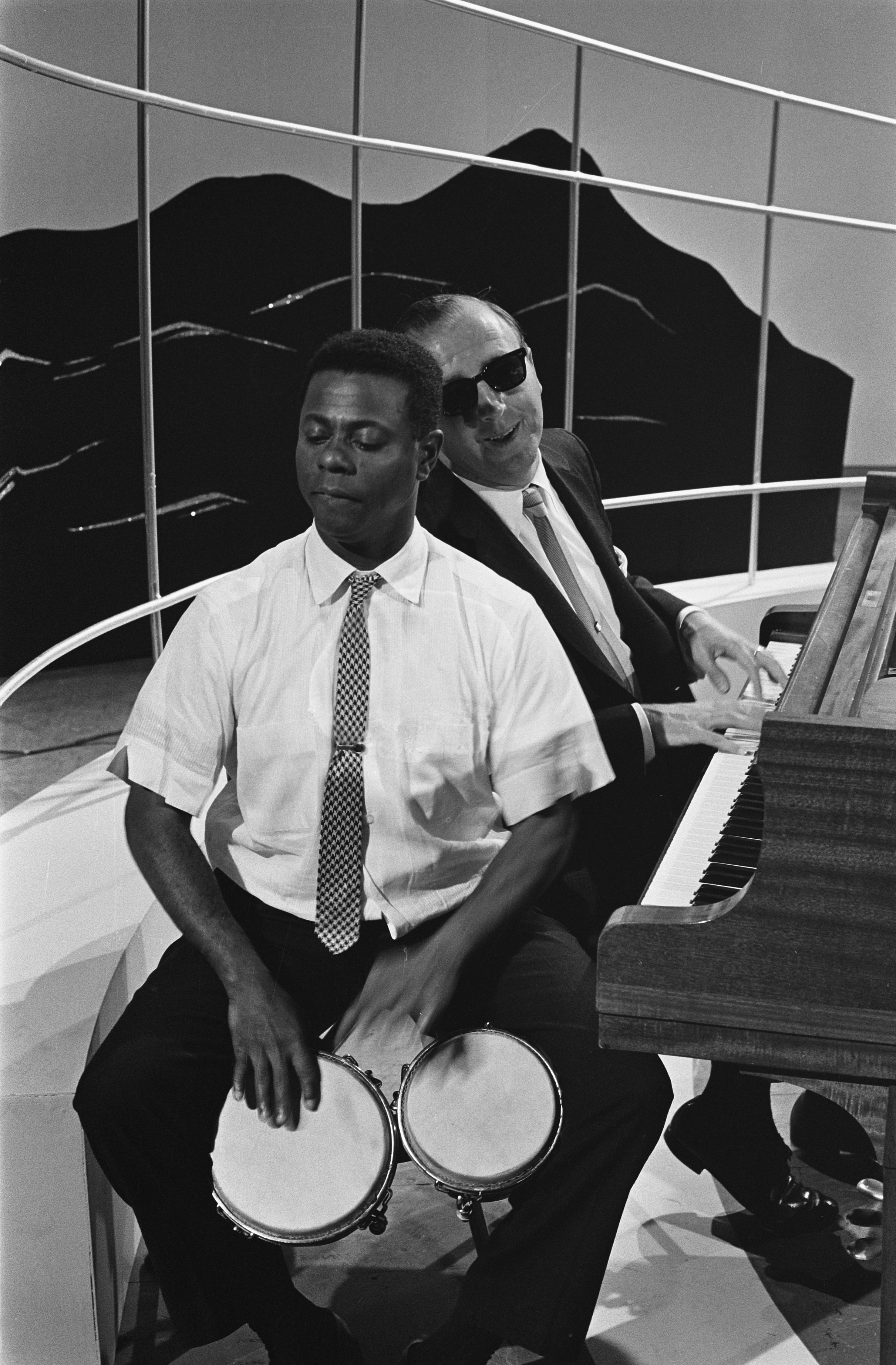 Collectie / Archief : Fotocollectie Anefo Reportage / Serie : [ onbekend ] Beschrijving : George Shearing Quintet in Holland, Hermando Peraza (bongospeler) en George Shearing tijdens de repetitie Datum : 23 september 1962 Trefwoorden : repetities Persoonsnaam : George Shearing, George Shearing Quintet Fotograaf : Gelderen, Hugo van / Anefo Auteursrechthebbende : Nationaal Archief Materiaalsoort : Negatief (zwart/wit) Nummer archiefinventaris : bekijk toegang 2.24.01.05 Bestanddeelnummer : 914-3361